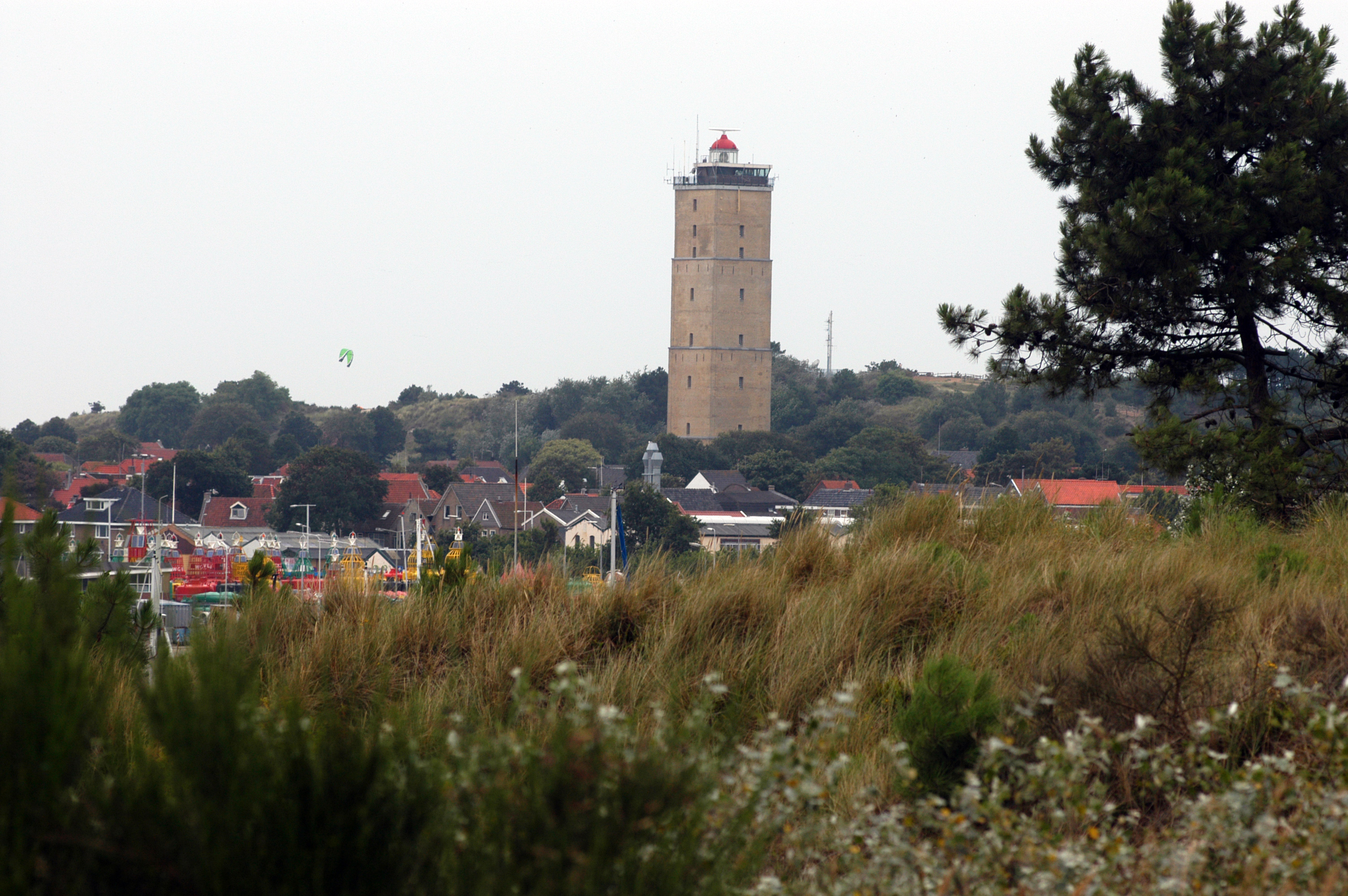 Brandaris van veraf